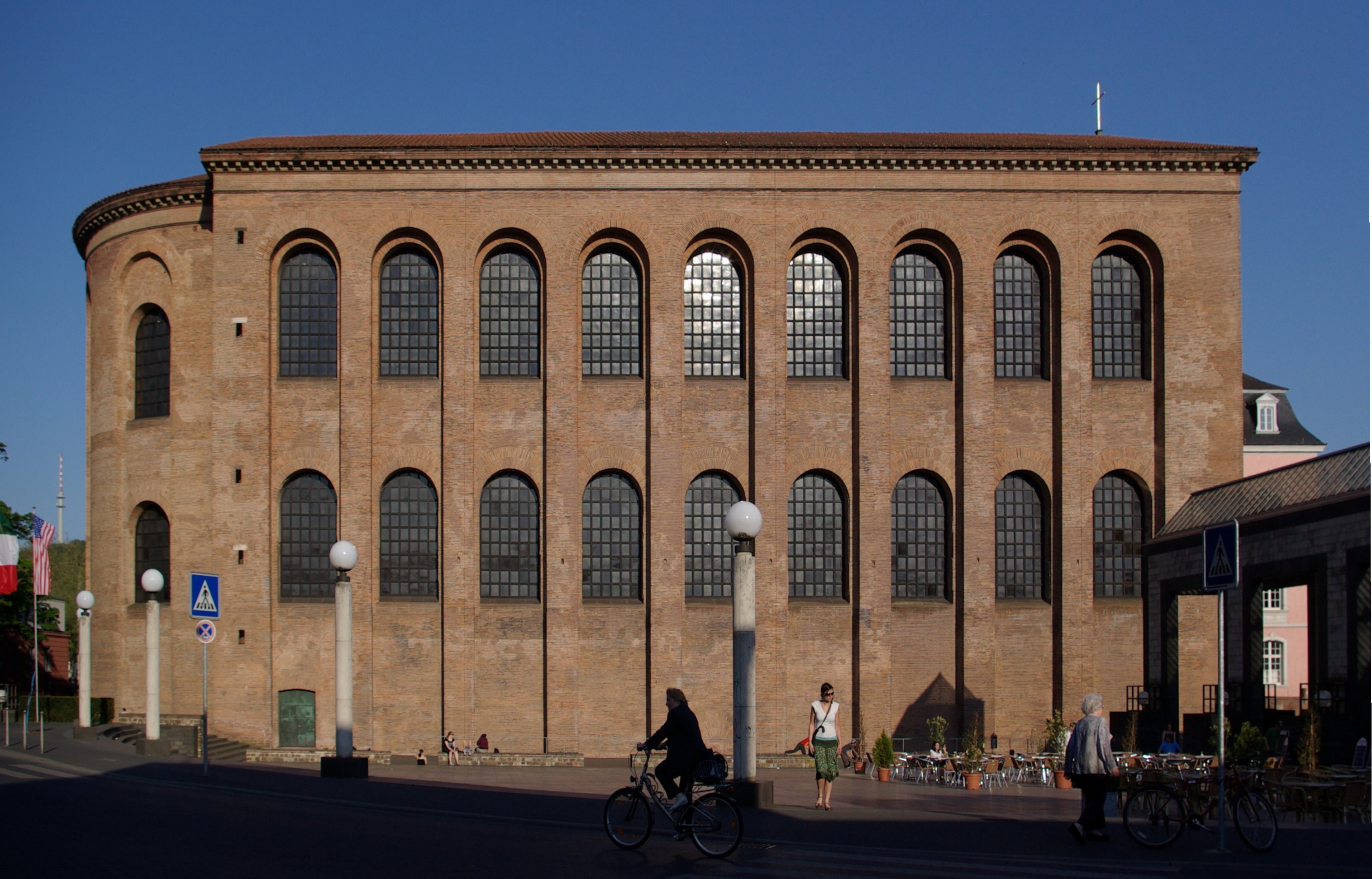 Konstantinbasilika in Trier